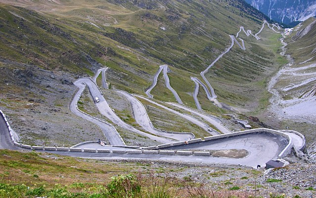 Passo dello Stelvio, Augustus 2005